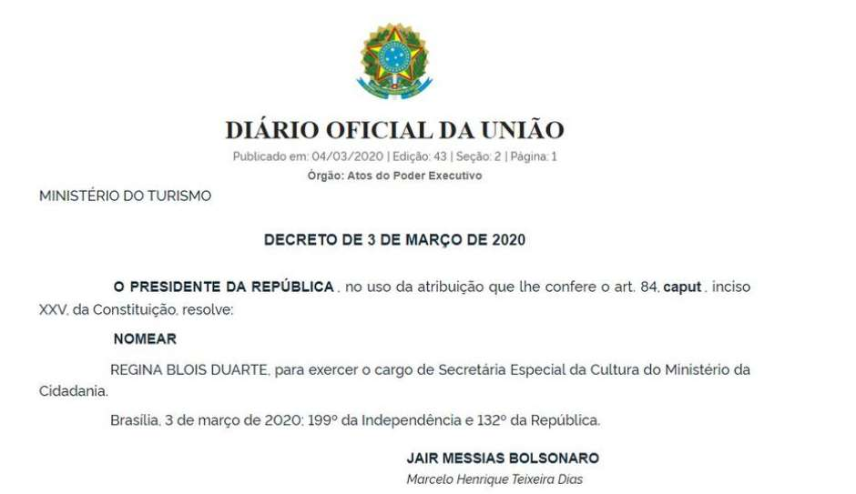 Decreto presidencial de nomeação de Regina Duarte para a secretária Especial da Cultura no governo Jair Bolsonaro.